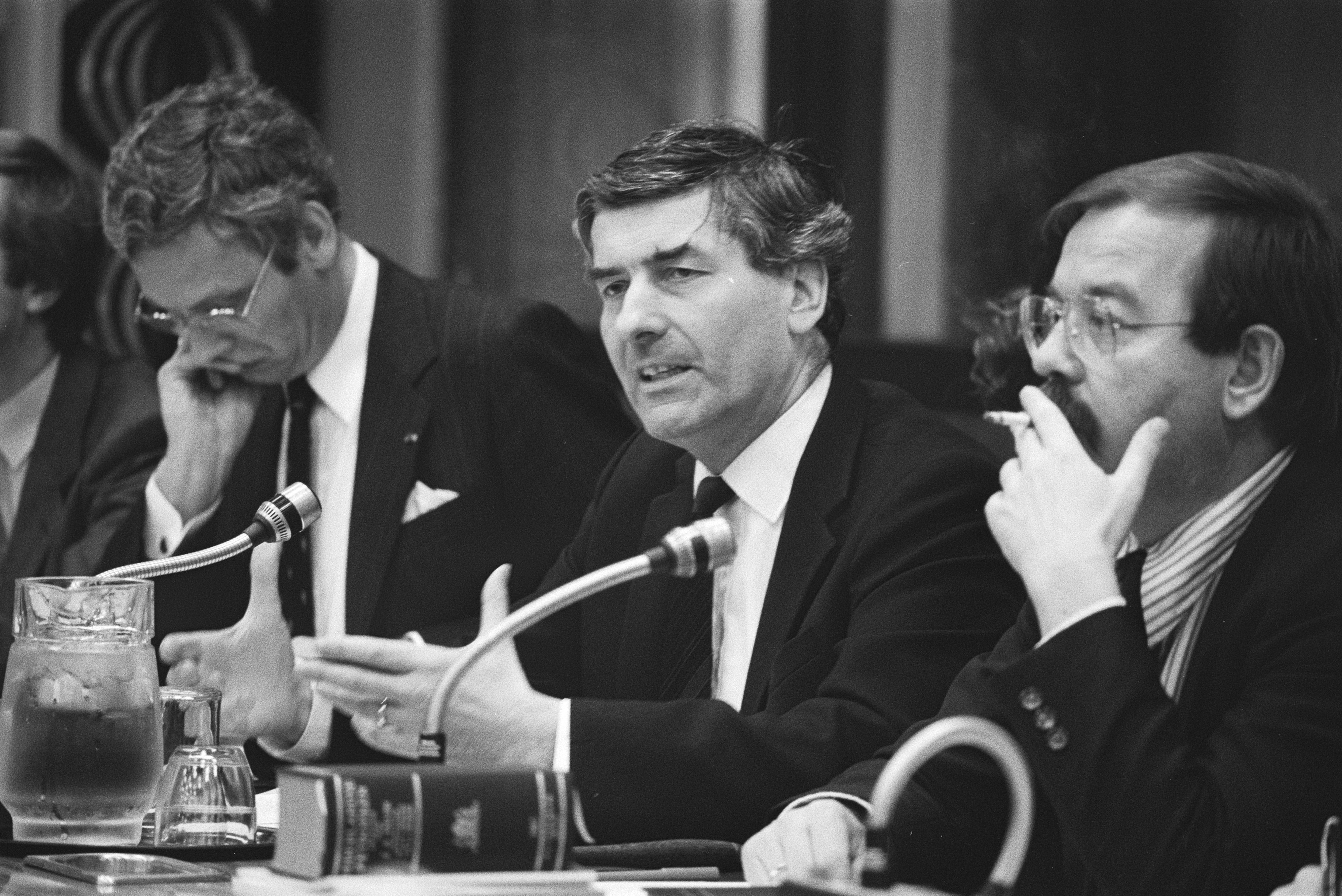 Collectie / Archief : Fotocollectie Anefo Reportage / Serie : [ onbekend ] Beschrijving : Tweede Kamer , Commissie Buitenlandse Zaken met Lubbers en minister Van de Broek i.v.m. "reisverslag" Lubbers over reis VS Datum : 8 februari 1984 Trefwoorden : commissies, premiers Persoonsnaam : Broek, Hans van der Fotograaf : Croes, Rob C. / Anefo Auteursrechthebbende : Nationaal Archief Materiaalsoort : Negatief (zwart/wit) Nummer archiefinventaris : bekijk toegang 2.24.01.05 Bestanddeelnummer : 932-8623